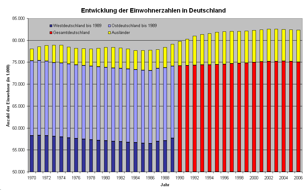 Die Grafik zeigt die Einwohnerzahlen Deutschlands, aufgeteilt in Bevölkerung aus Ost-, West- und Gesamtdeutschland deutscher Muttersprache sowie Ausländer (Ausländeranteil der DDR vernachlässigt).